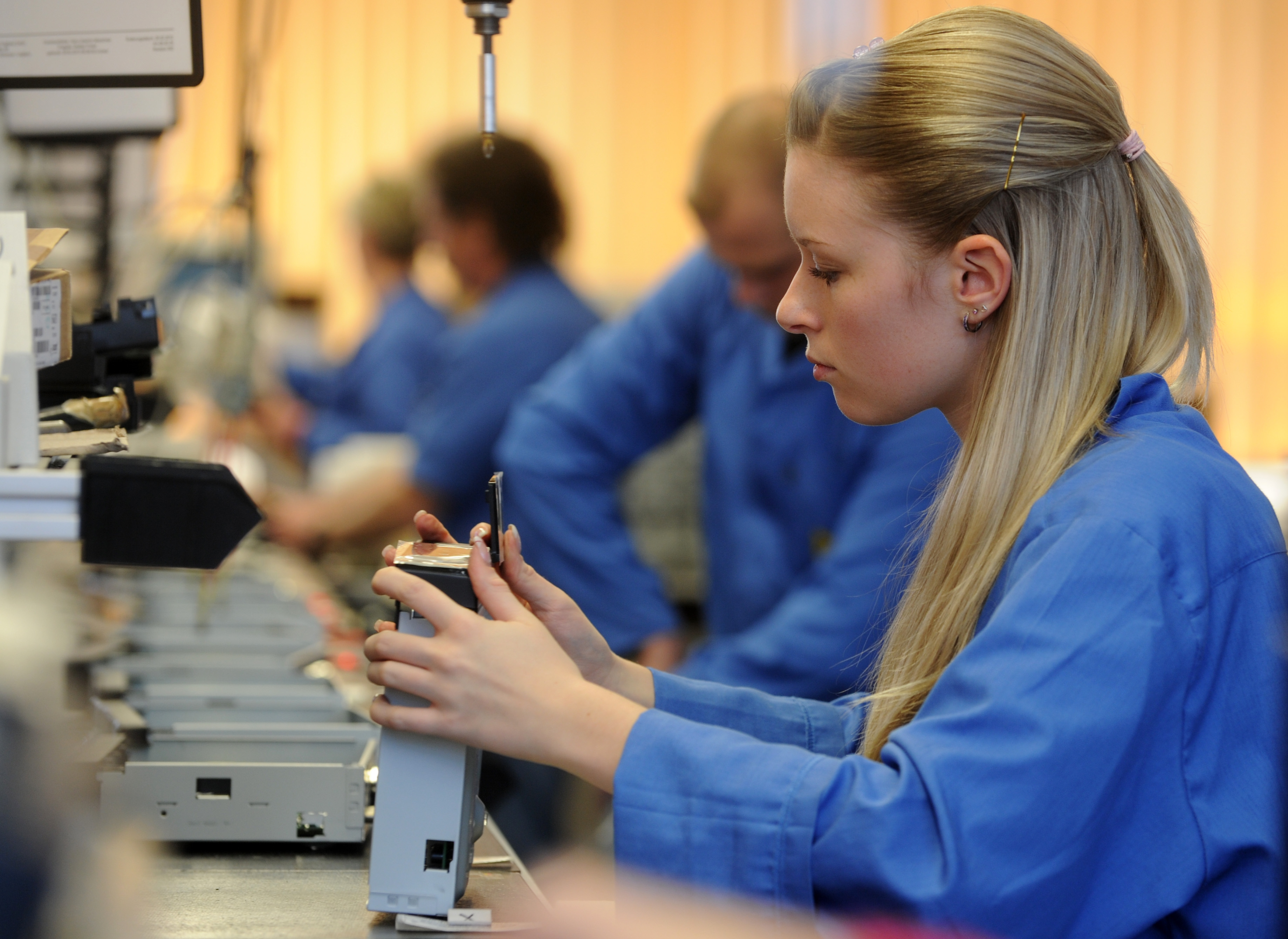 Receiver-Produktion in Schöneck